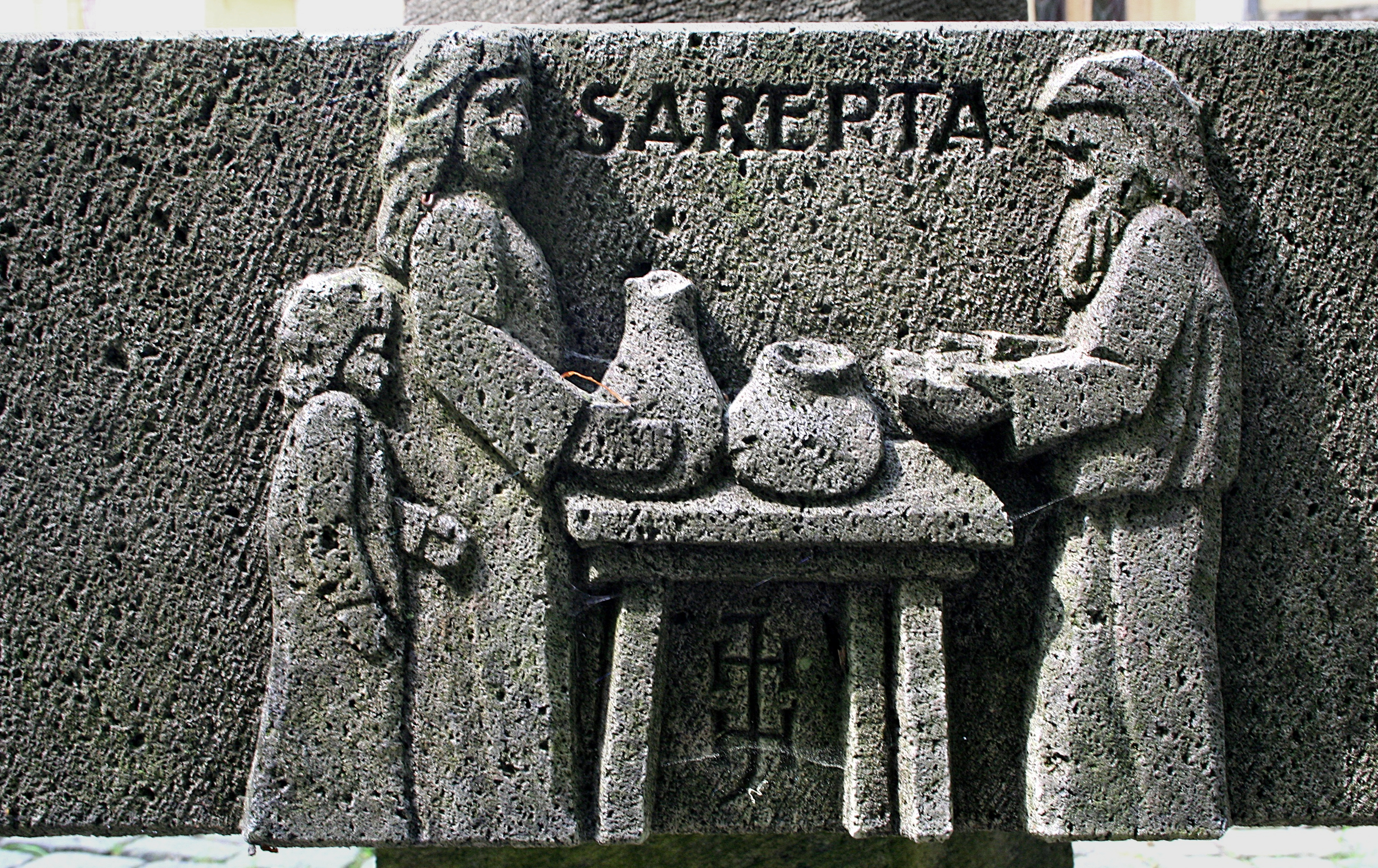 Detail des Simonsbrunnens an der Abtei Sayn von Hans-Joachim Hippel, Mayen: Der Prophet Elija hilft der Witwe von Sarepta (1. Buch der Könige 1 Kön 17, 8 - 24)